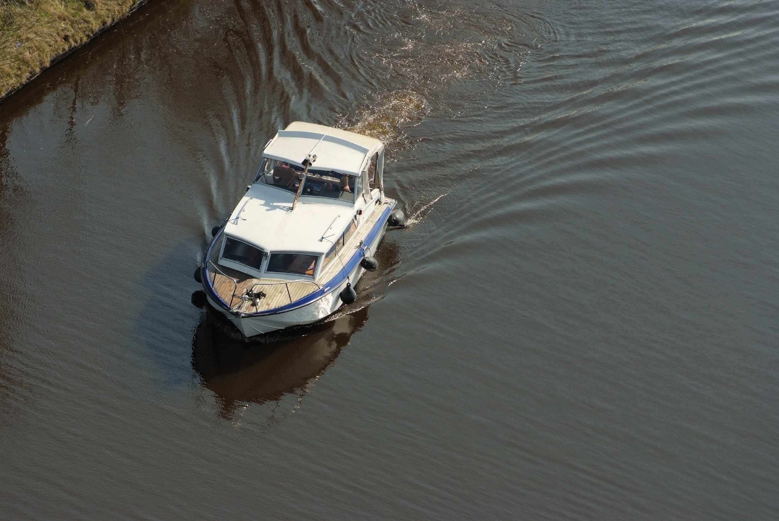 Boot auf dem Treckfahrtstief in Emden